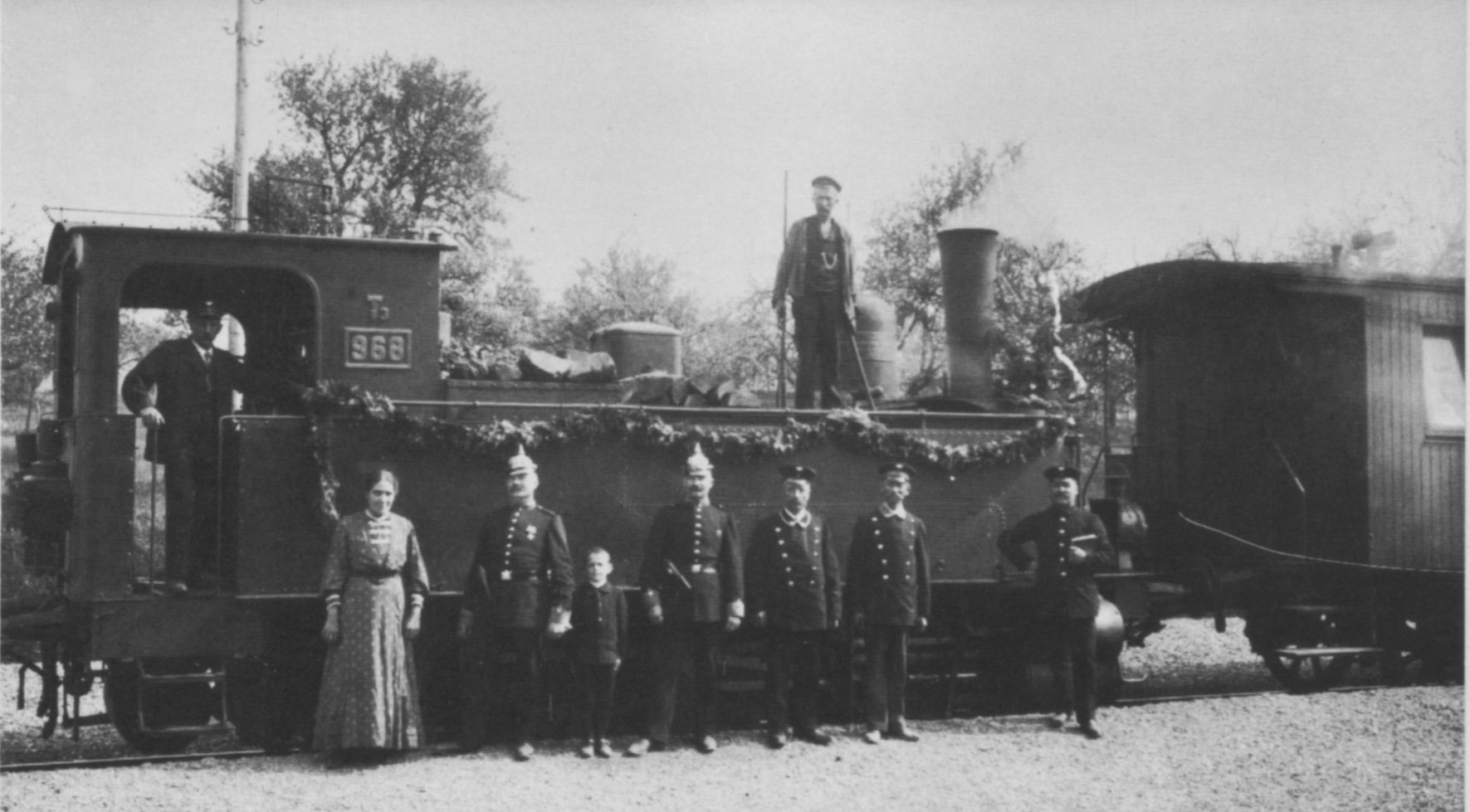 Eröffnungszug Schwäbisch Gmünd-Wäschenbeuren mit Dampflokomotive Württembergische T 3.